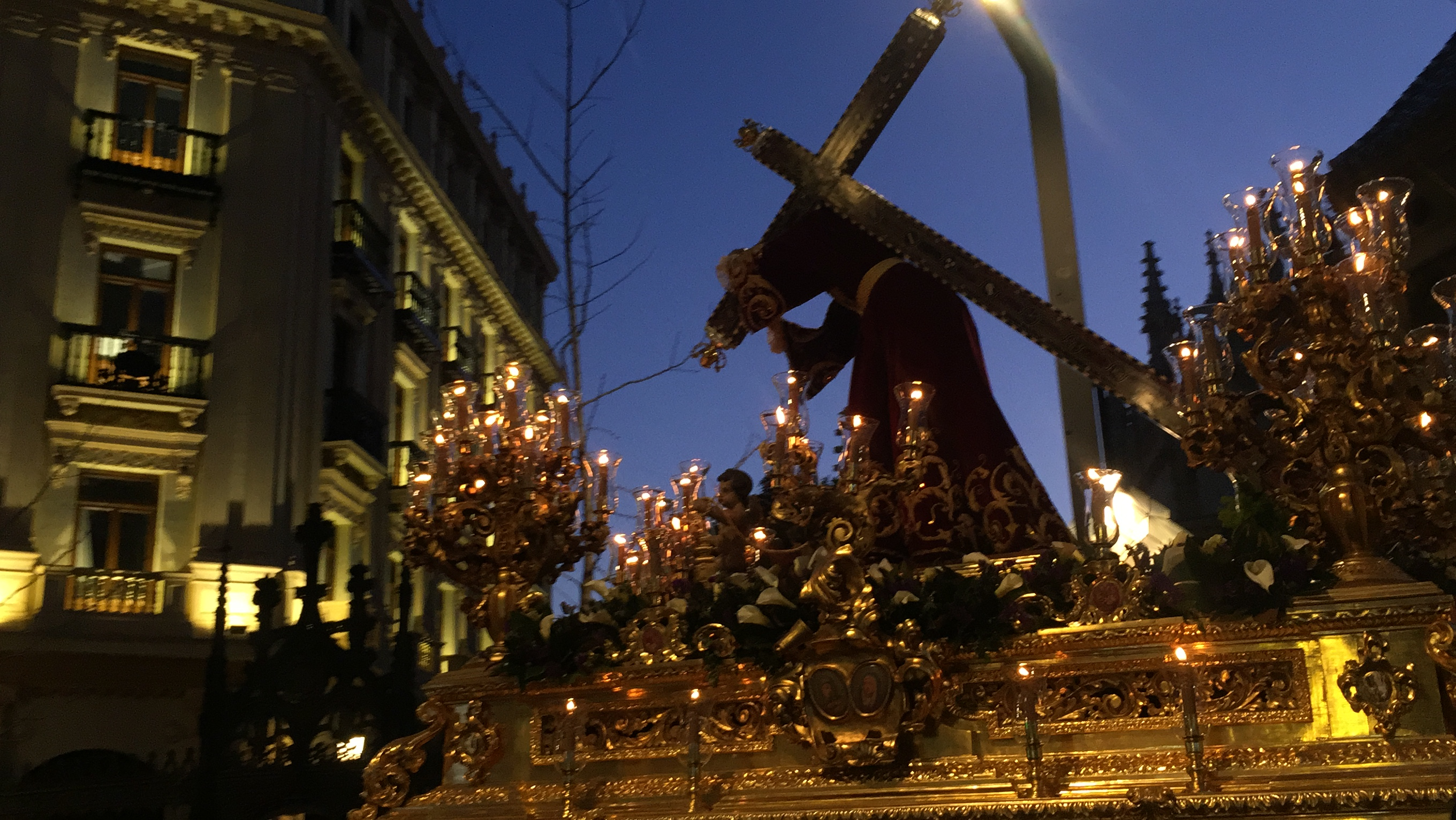 Vía crucis